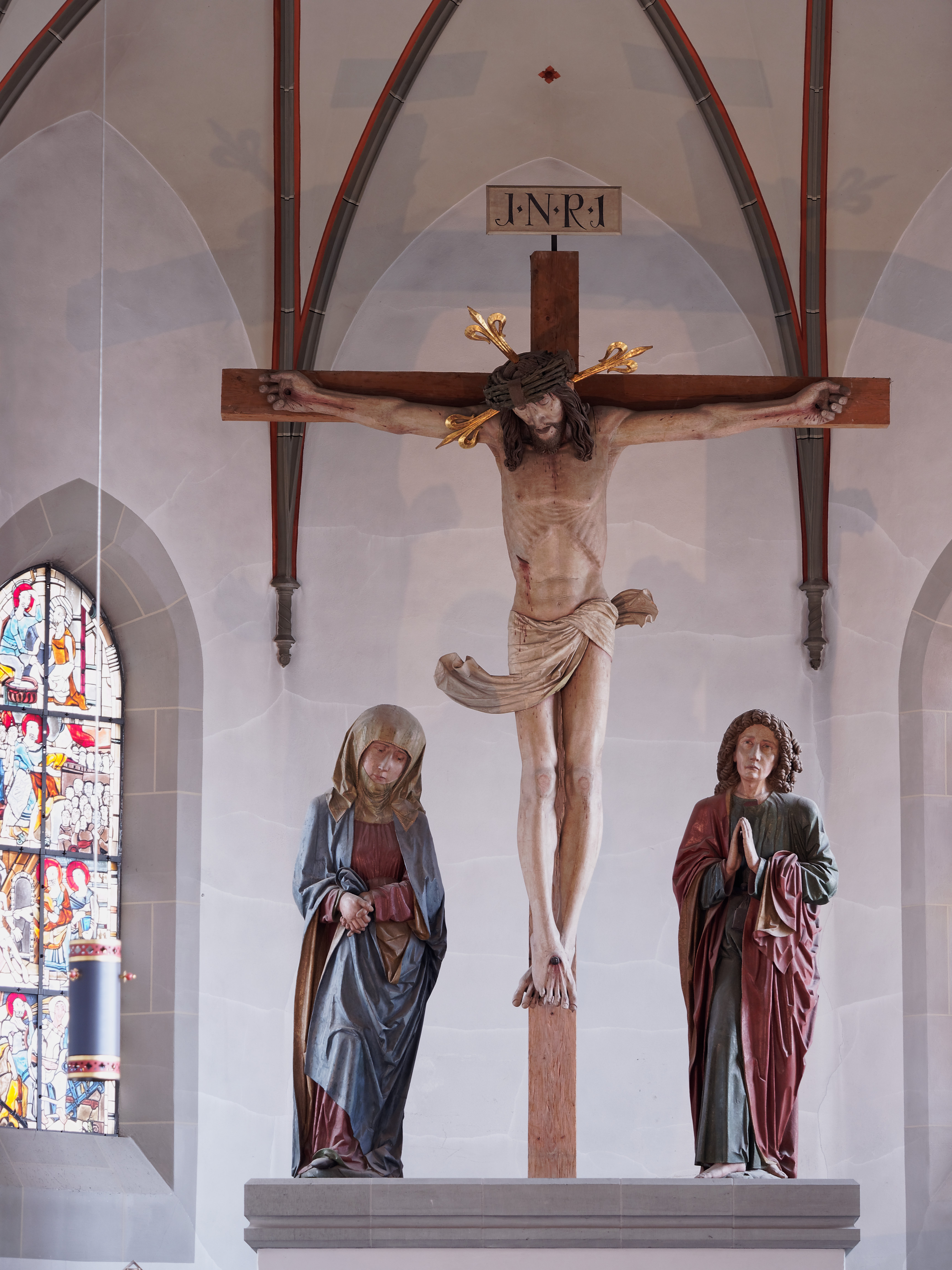 Oberstaufen St. Pater und Paul, Große Kreuzigunsgruppe im Chor, Ansicht von Westen, Baudenkmal